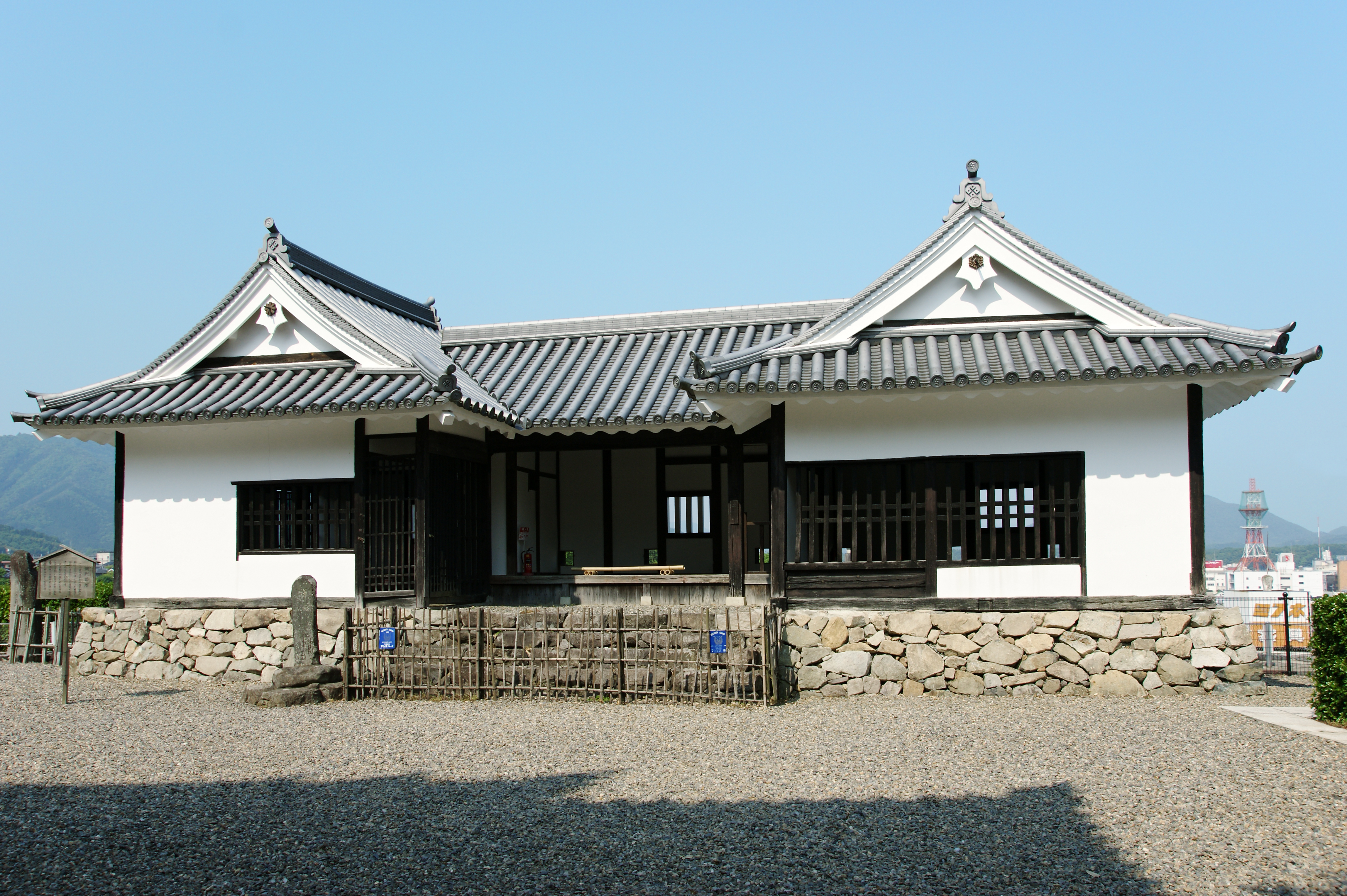 Fukuchiyama Castle in Fukuchiyama, Kyoto prefecture, Japan